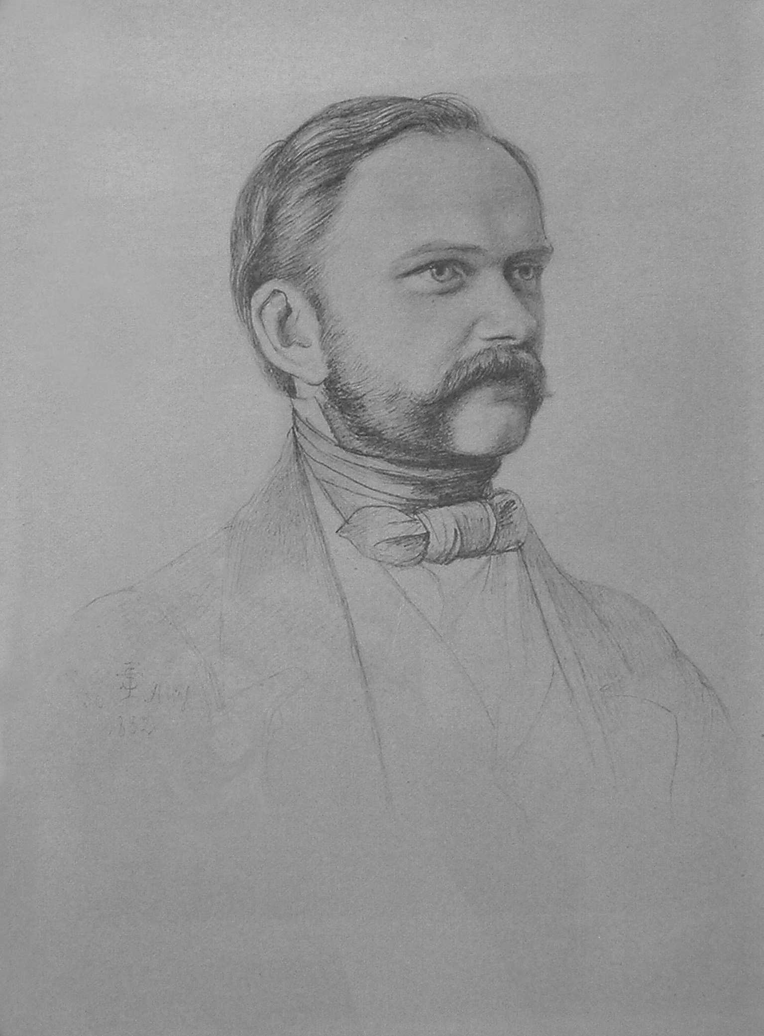 Der preussische Architekt Ferdinand von Arnim (1814-1866)